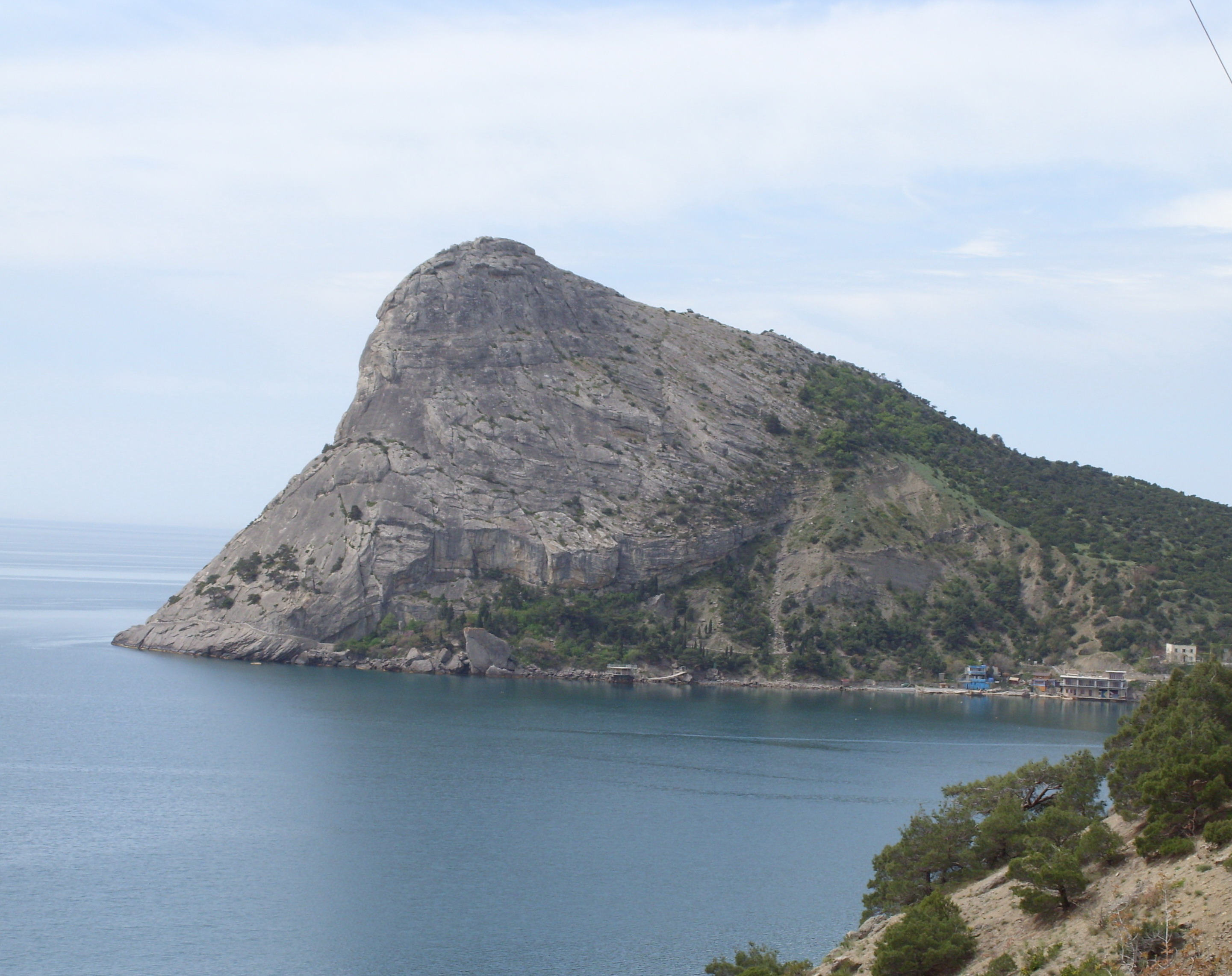 Коба-Кая